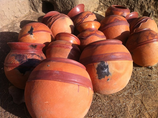 Canaris made in Segou (Mali)